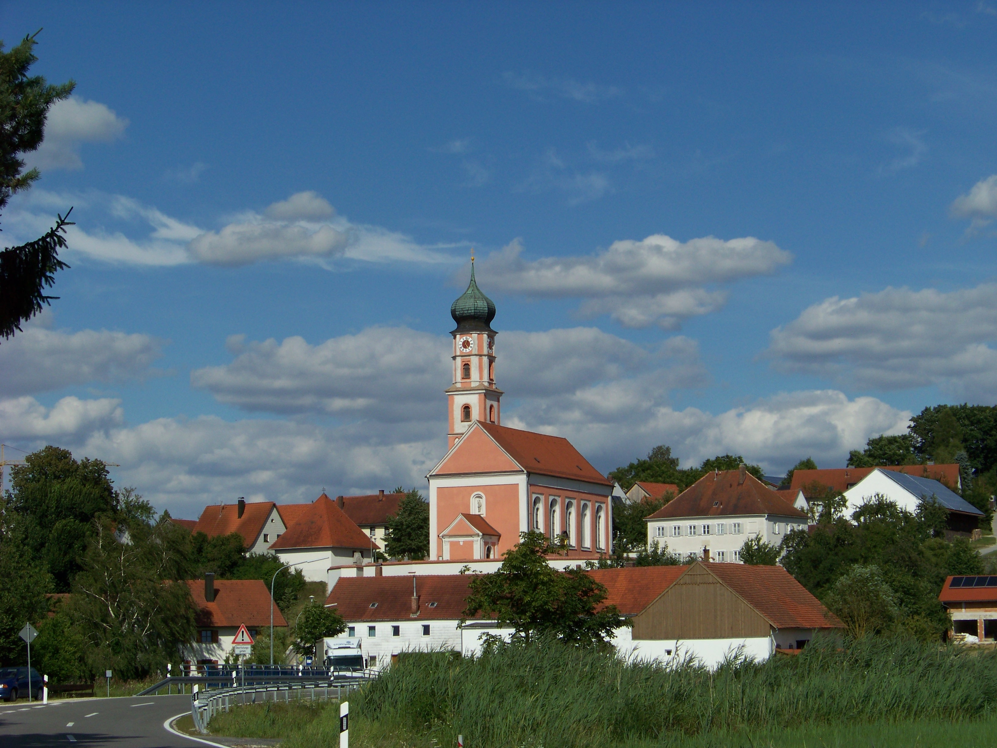 Rohr, Laaberberg, Kirchweg 9. Kath. Pfarrkirche Mariä Opferung, Saalkirche mit Satteldach und wenig eingezogener, halbrunder Chorapsis, Flankenturm nach Norden mit Zwiebelhaube, barock, 1711, Turmunterbau spätmittelalterlich; mit Ausstattung.